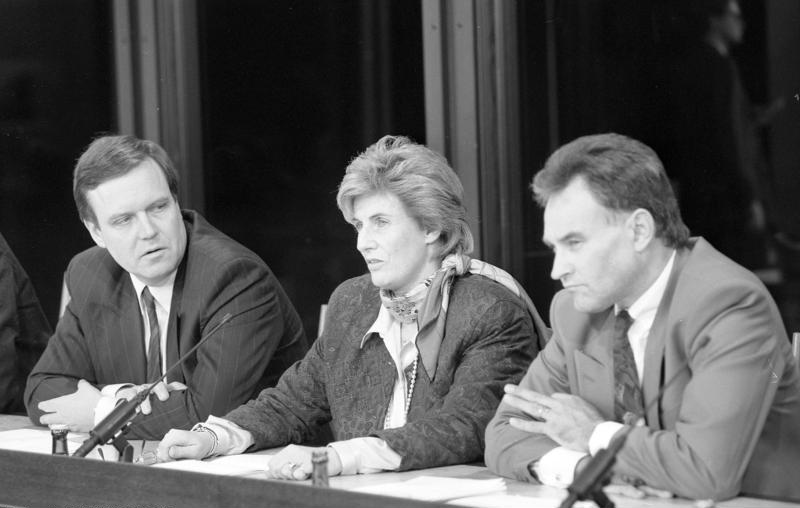 Bonn, 6.12.1990 Am ersten Tag der Koalitionsverhandlungen nach der Bundestagswahl vom 2.12.1990 gaben die Generalsekretäre der drei beteiligten Parteien, Volker Rühe, CDU, Cornelia Schmalz-Jacobsen, FDP, und Erwin Huber, CSU, eine Pressekonferenz im Info-Saal des Bundeskanzleramtes. Die Gespräche während der Verhandlungen wurden allgemein als sachlich und zielorientiert bezeichnet und sollen im Hinblick auf die noch für Dezember geplante Wahl des Bundeskanzlers zügig abgeschlossen werden.